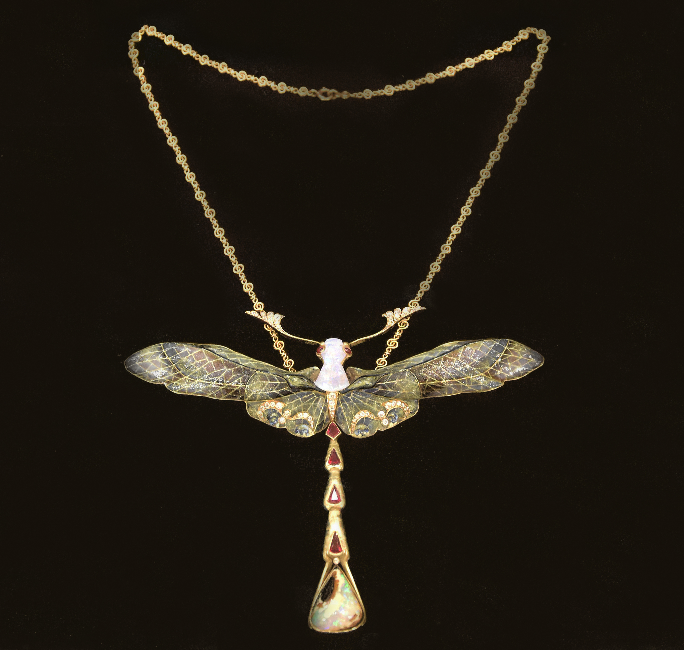 Philippe Wolfers (1858-1929) Libel (hanger 1902-03) KMKG Brussel 18-12-2018